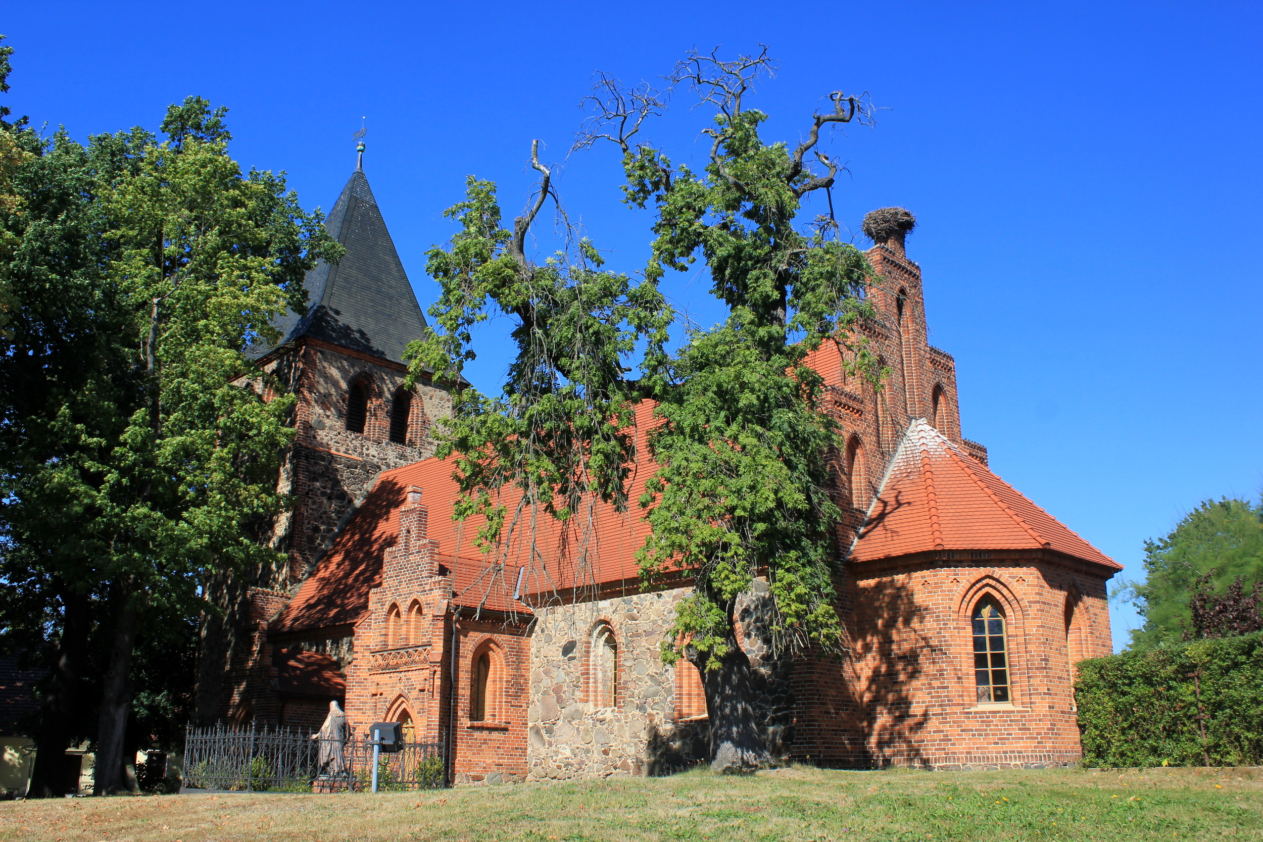 Hornjoserbsce: Ewangelska cyrkej w Skjarbošcu pola Drjowka.